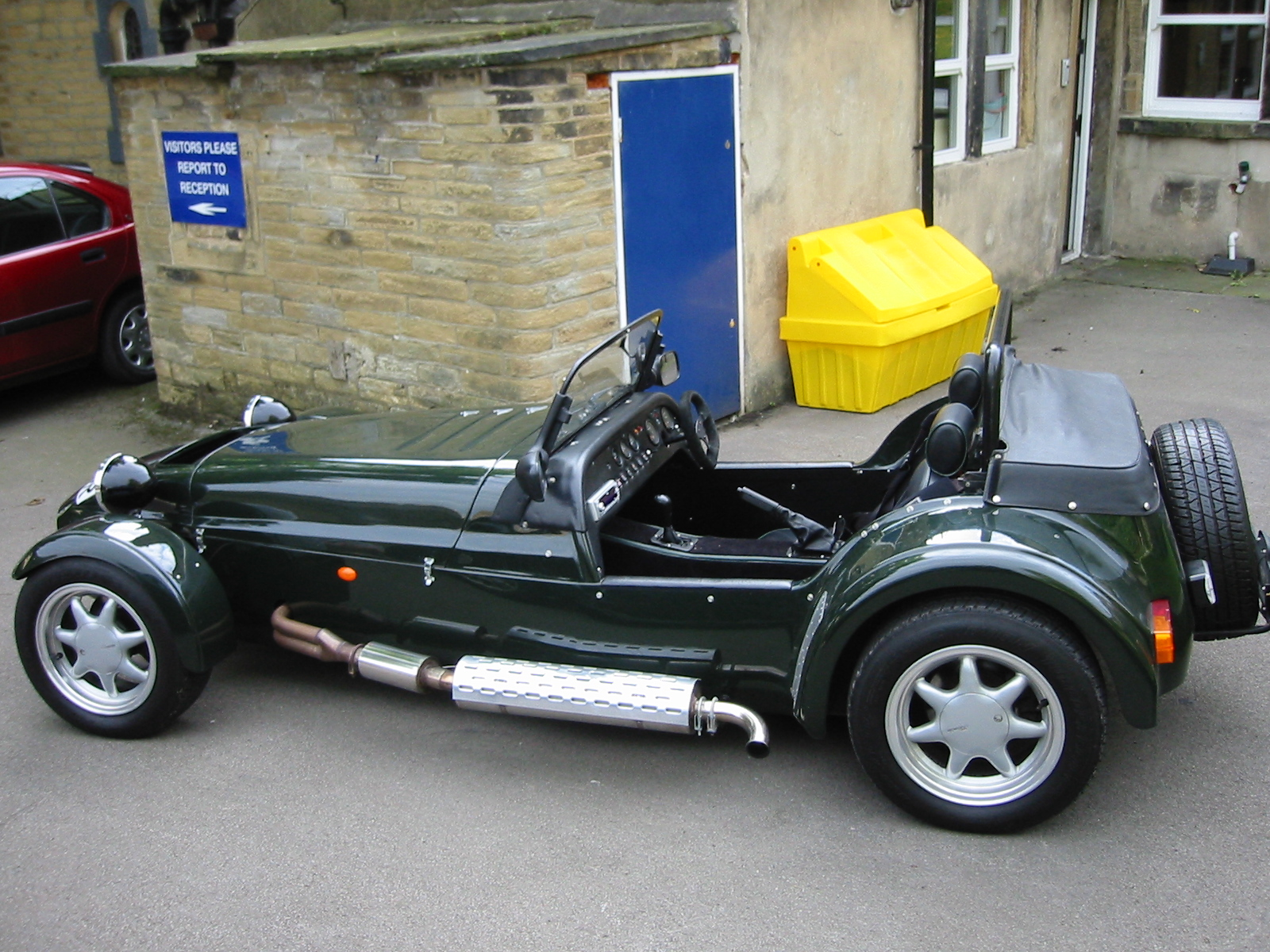 1997 Westfield SEi